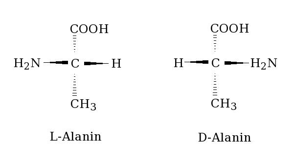 L-Alanin D-Alanin